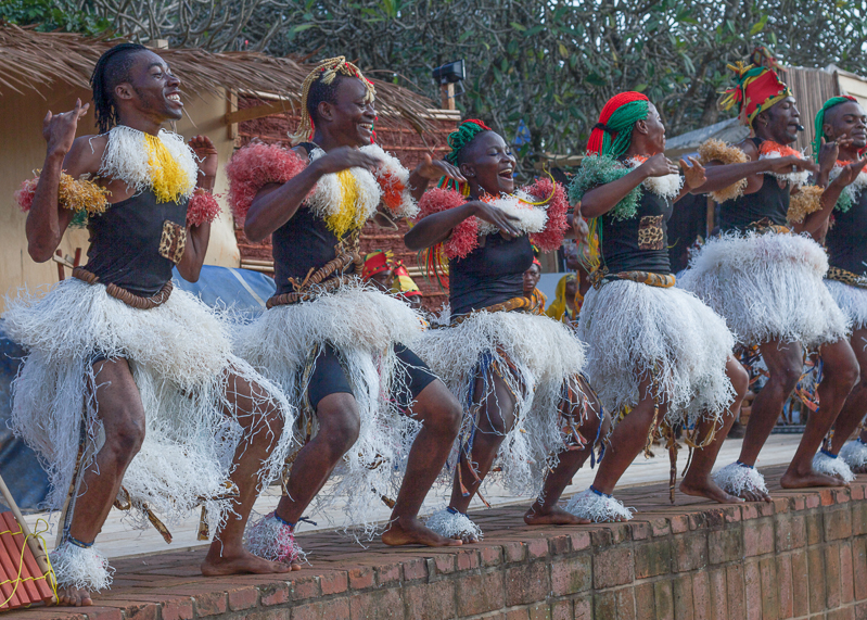 Danseurs(ses) du Bikutsi (Région du Centre-Cameroun)